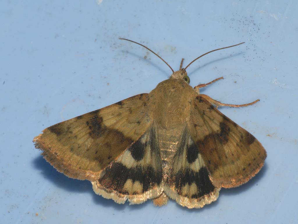 Exemplar found: Russia, Moscow Oblast, Odintsovsky District, near village Pestovo, 04.08.2010, by light МО, Одинцовский р-н, окрестности деревни Пестово, 04.08.2010, на свет